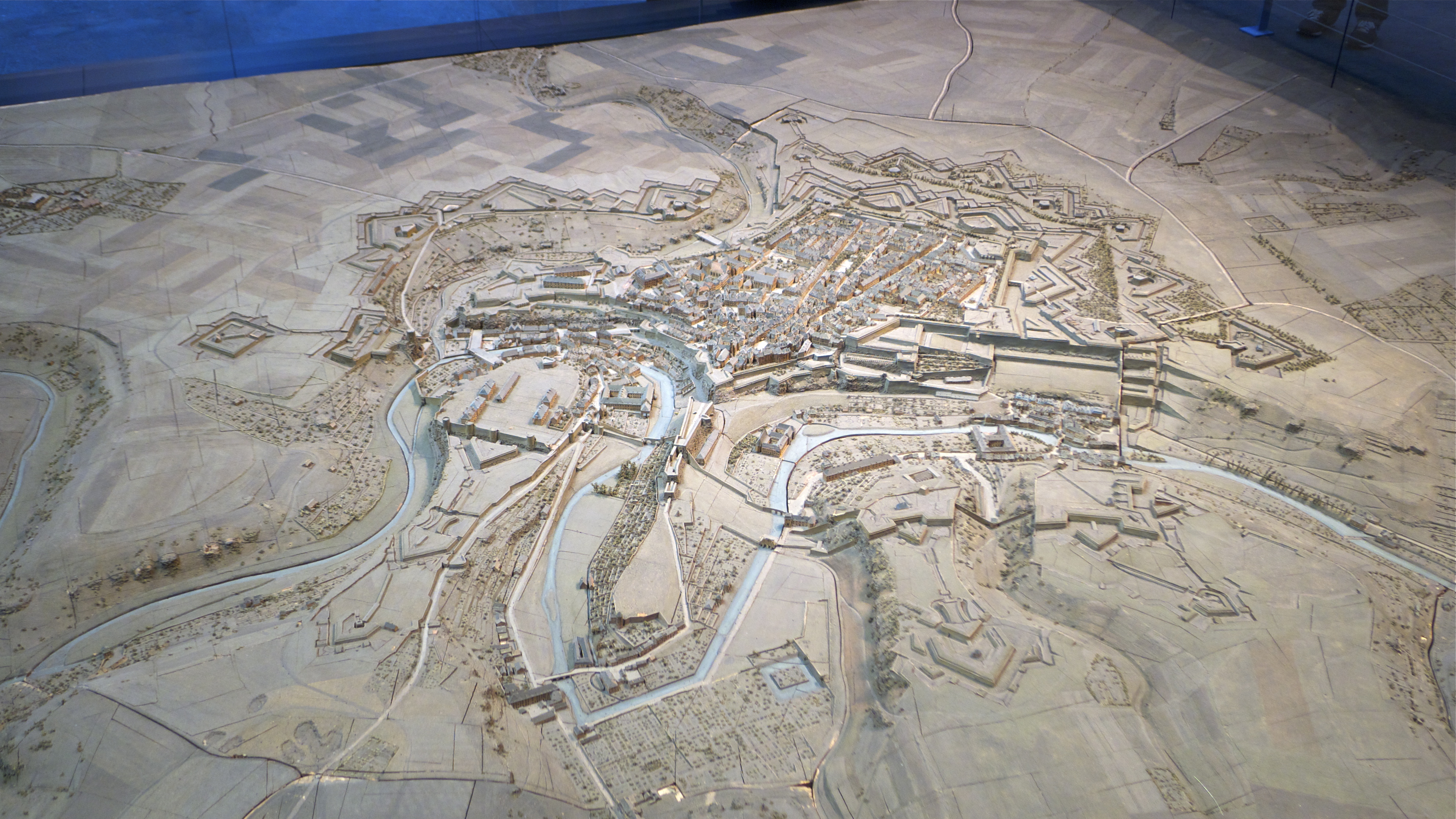 Plan-relief de Luxembourg en 1805. Plan-relief construit de 1802 à 1805. Échelle 1/600e